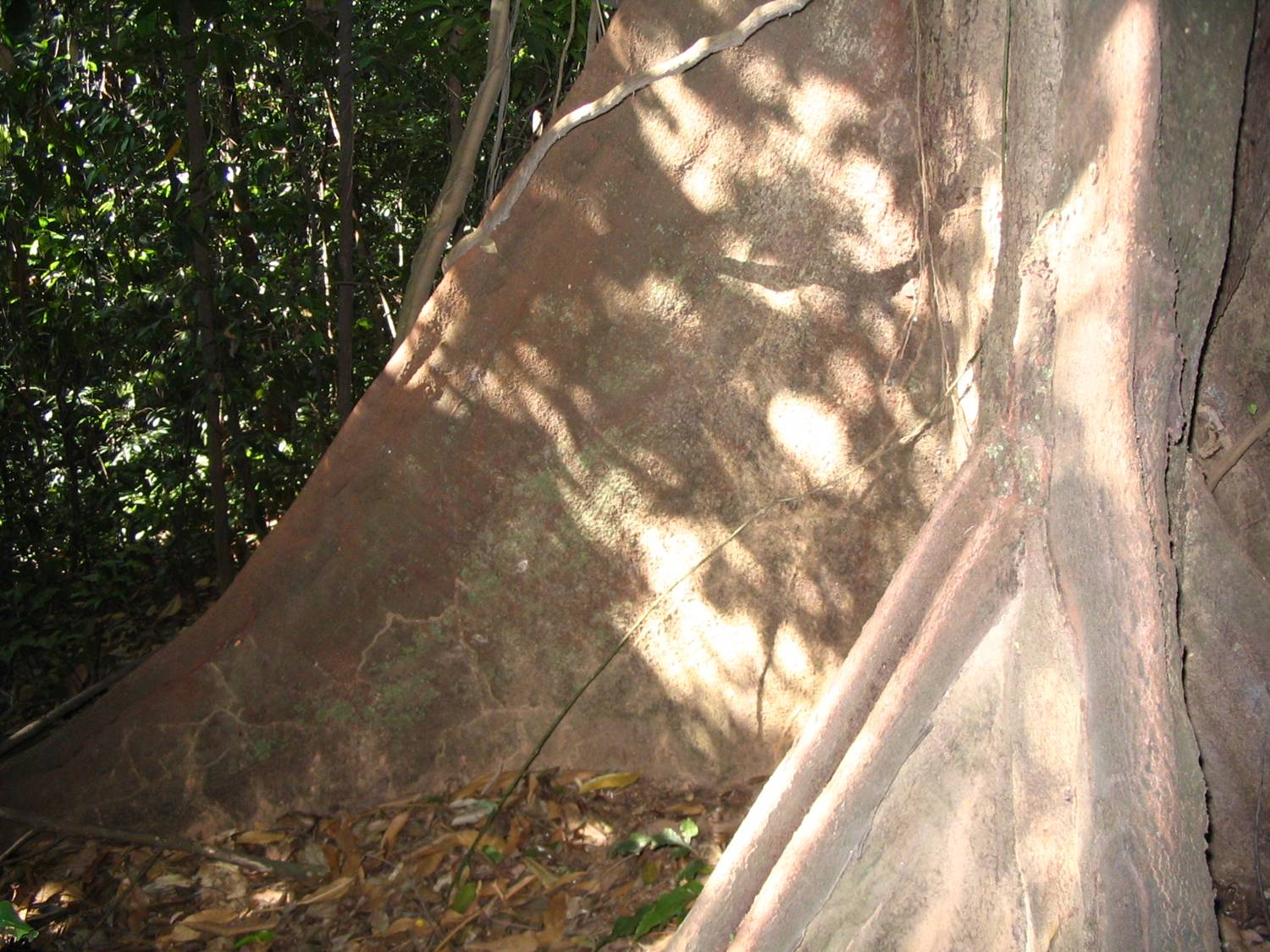 Coelostegia griffithii base du tronc